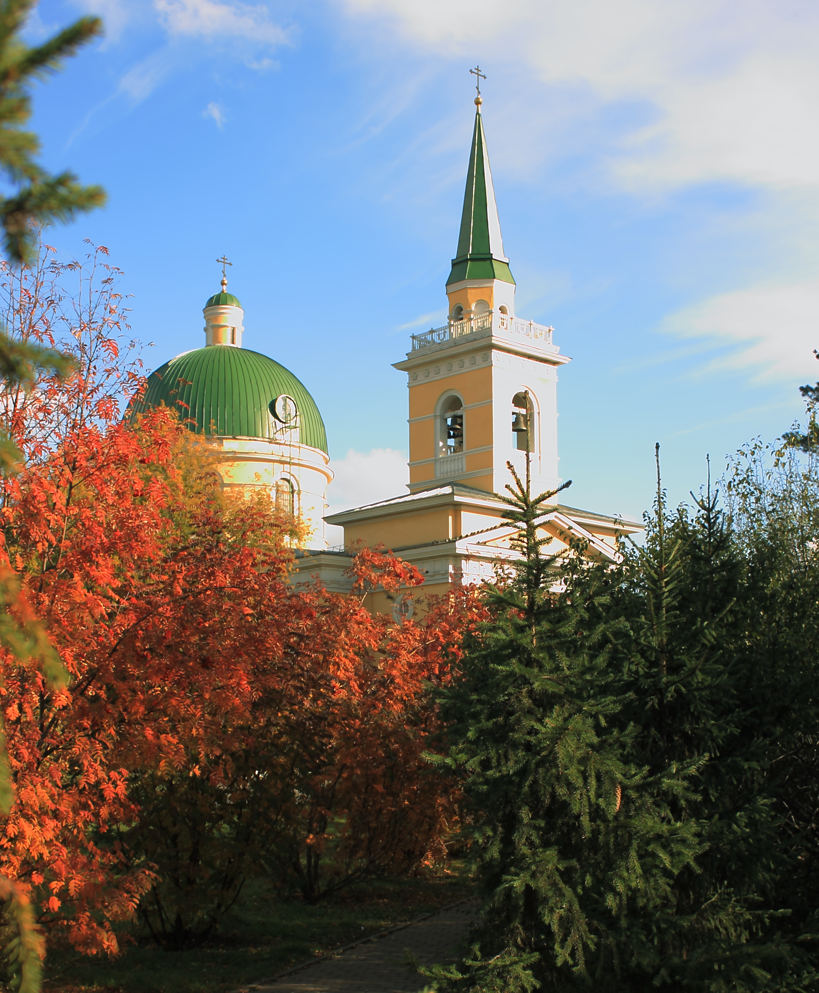 Собор Никольский Казачий: улица Ленина, 27-а, Омск, Омская область